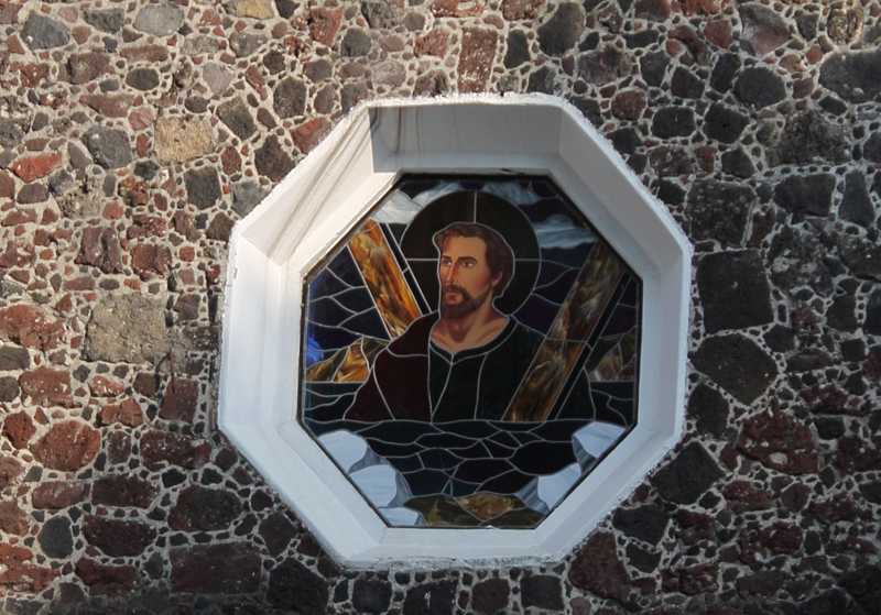 San Andres Apostol Fachada de la Iglesia San Andres Tetepilco